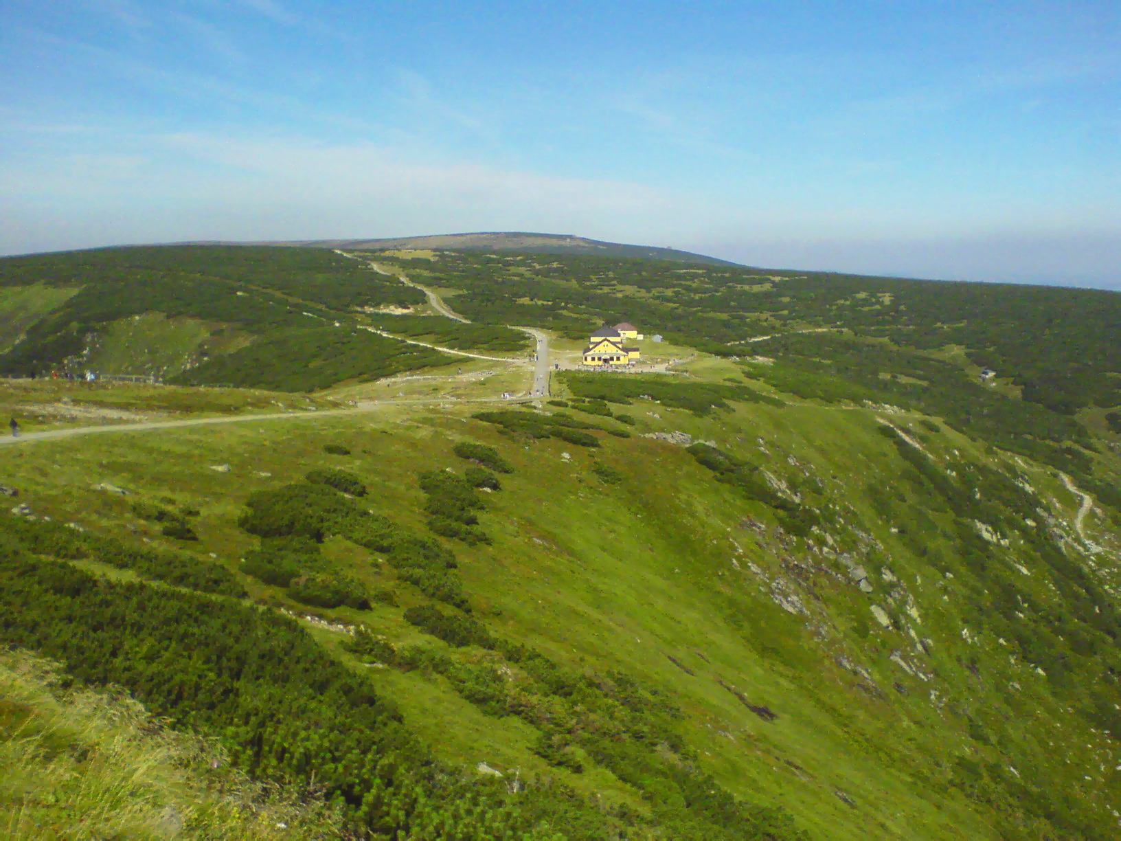 Równina pod Śnieżką